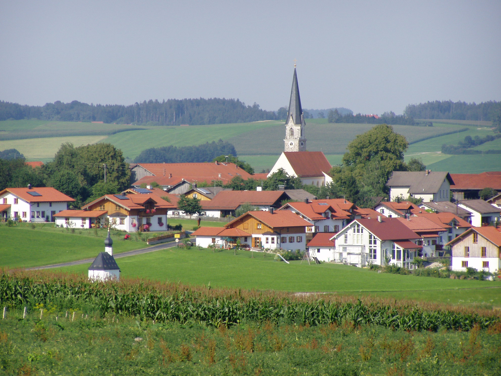 Berganger, Baiern